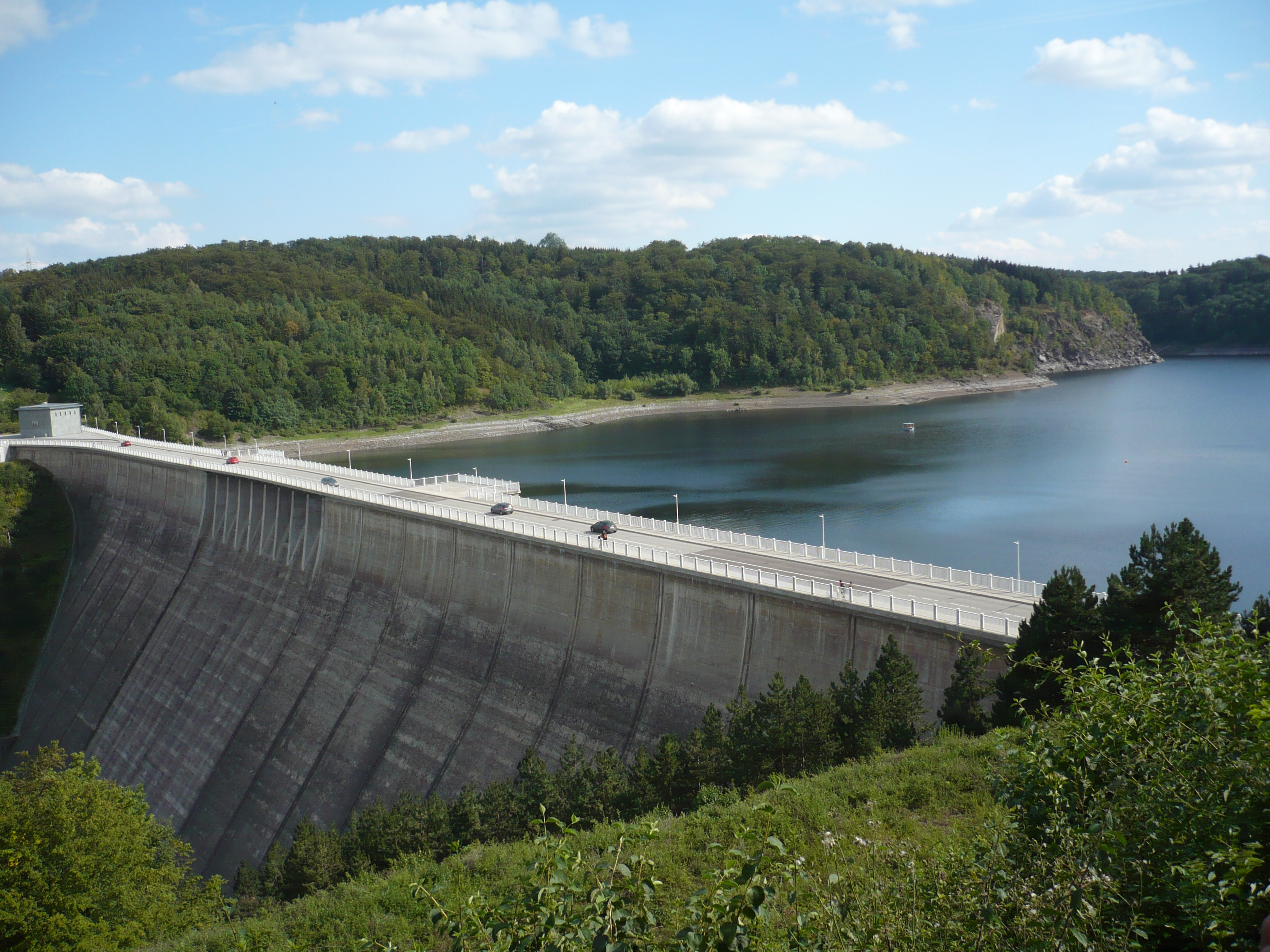 Rappbodetalsperre